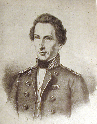 Frederik Læssøe , danish officer